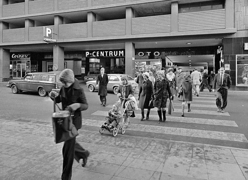 Parkeringshuset P-Centrum vid Slöjdgatan 3, var Sveriges första parkeringshus för korttidsparkering